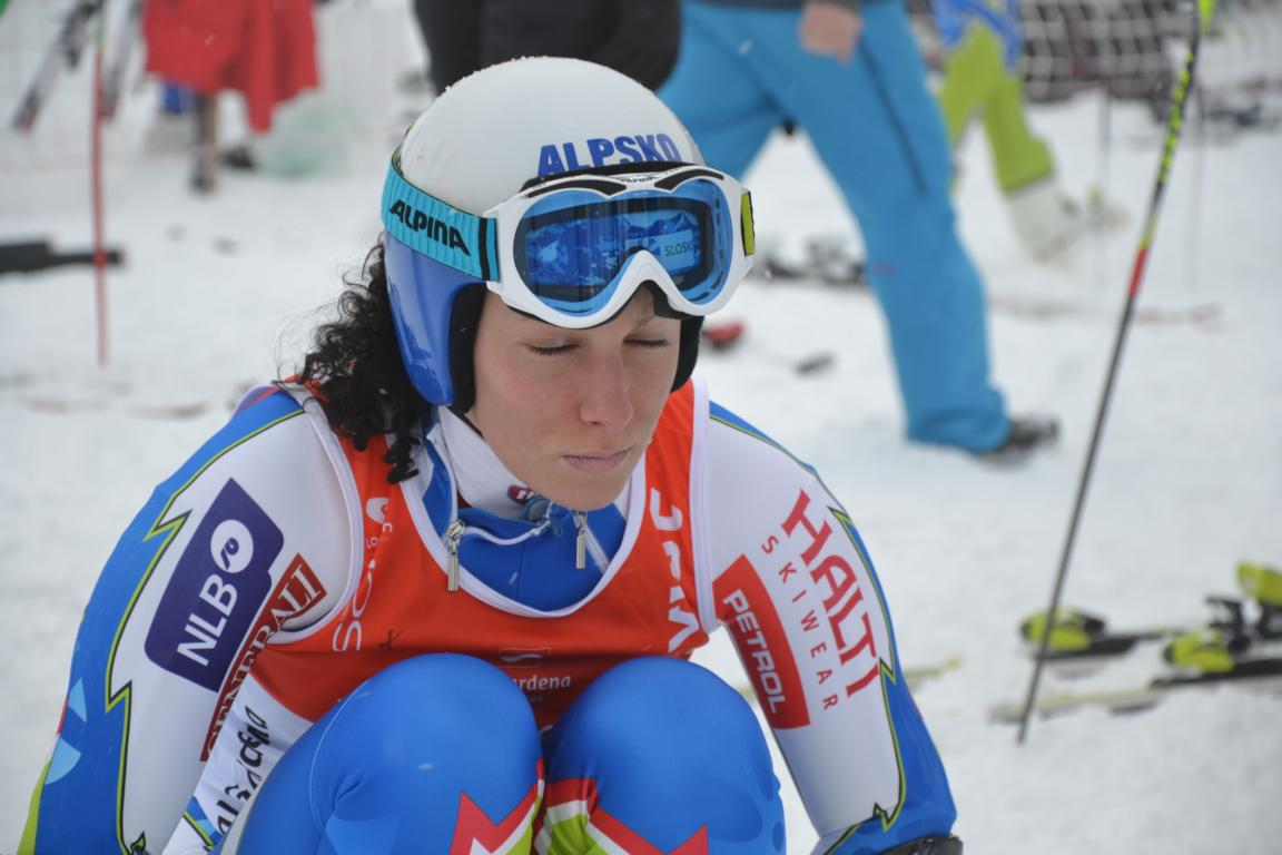 Ilka Štuhec